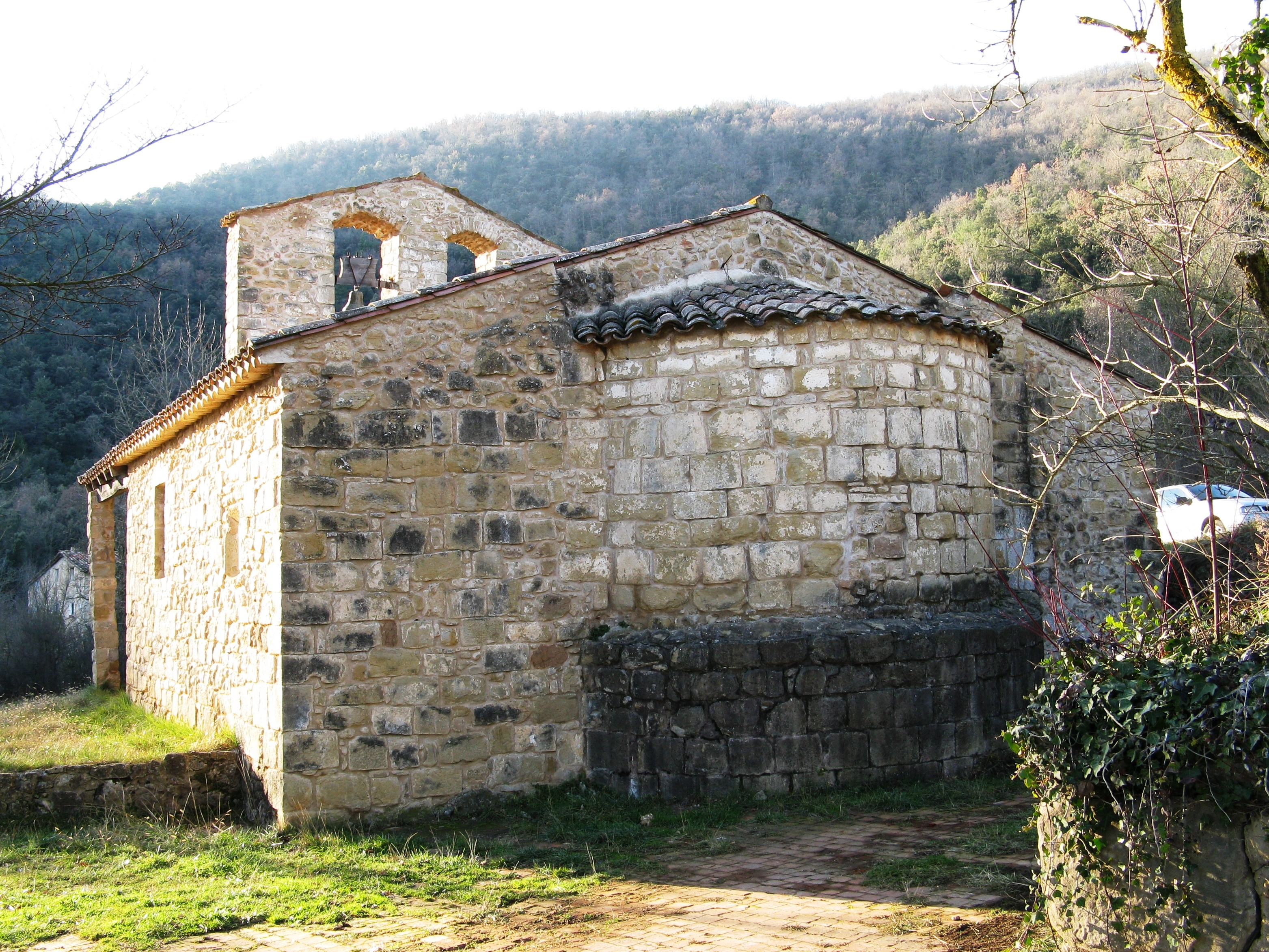 Romanische Kirche „Sant Joan dels Balbs“ (Einsiedelei) im „Val de Bas“, nahe der Ortschaft „La Pinya“, Katalonien, Spanien) - Apsis